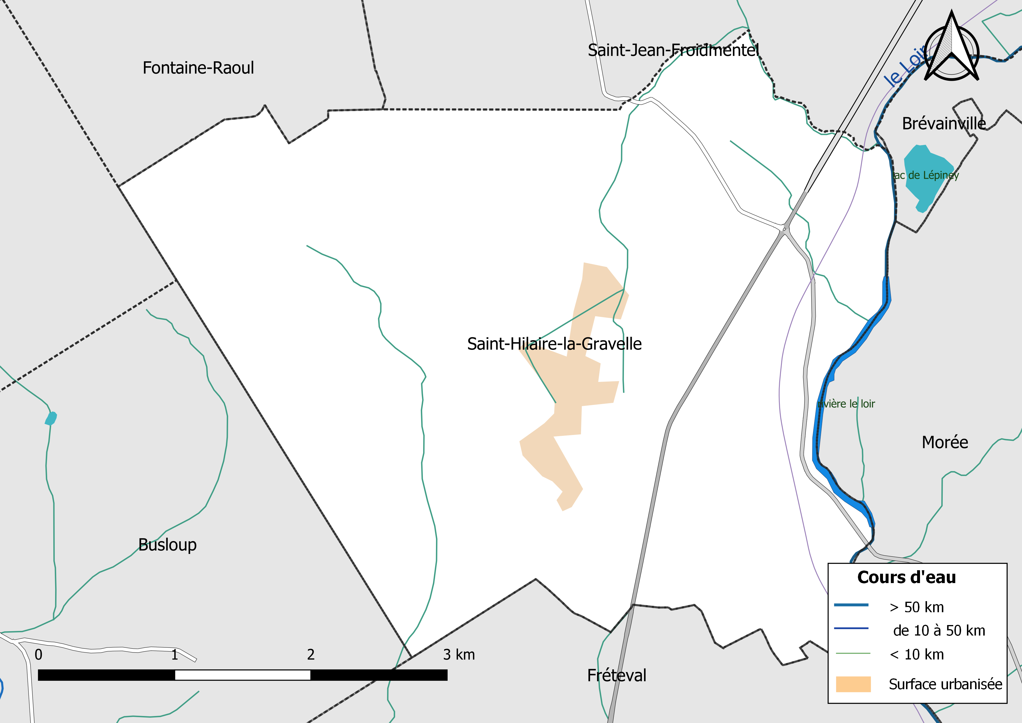 Carte du réseau hydrographique de la commune de Saint-Hilaire-la-Gravelle (Loir-et-Cher, France).